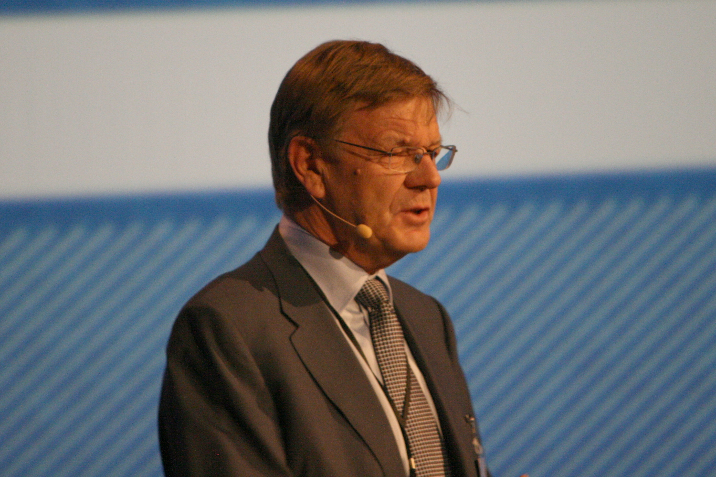 Finn Bergesen jr., NHO-direktør. Fra NHOs Årskonferanse 2009.